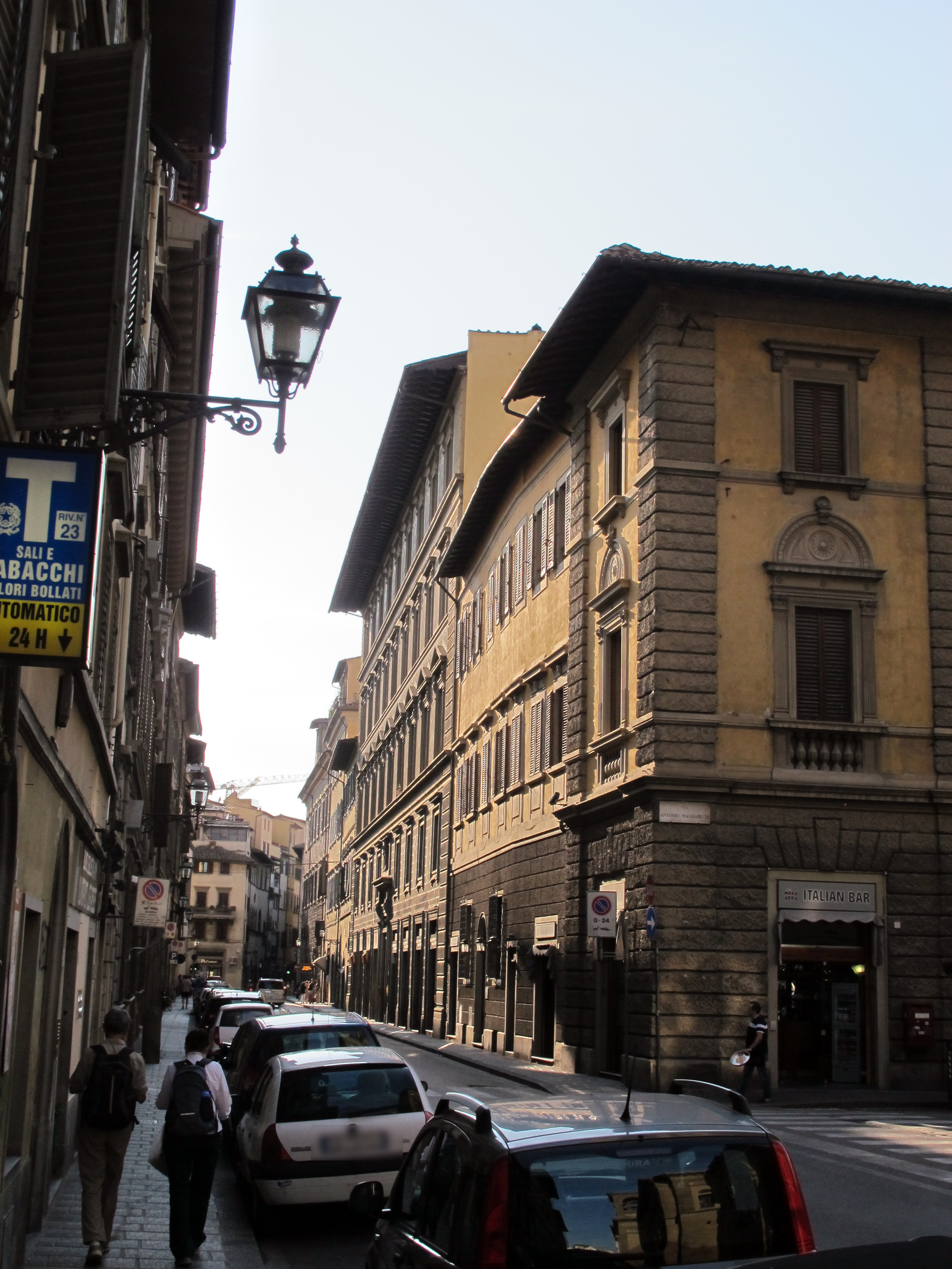 Corso tintori, Firence